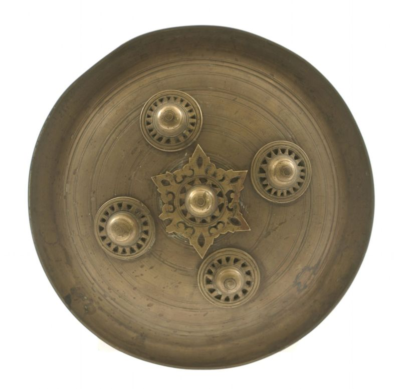 Schild. Rond messing schild versierd met messing knoppen Unknown language: Peurise teumaga